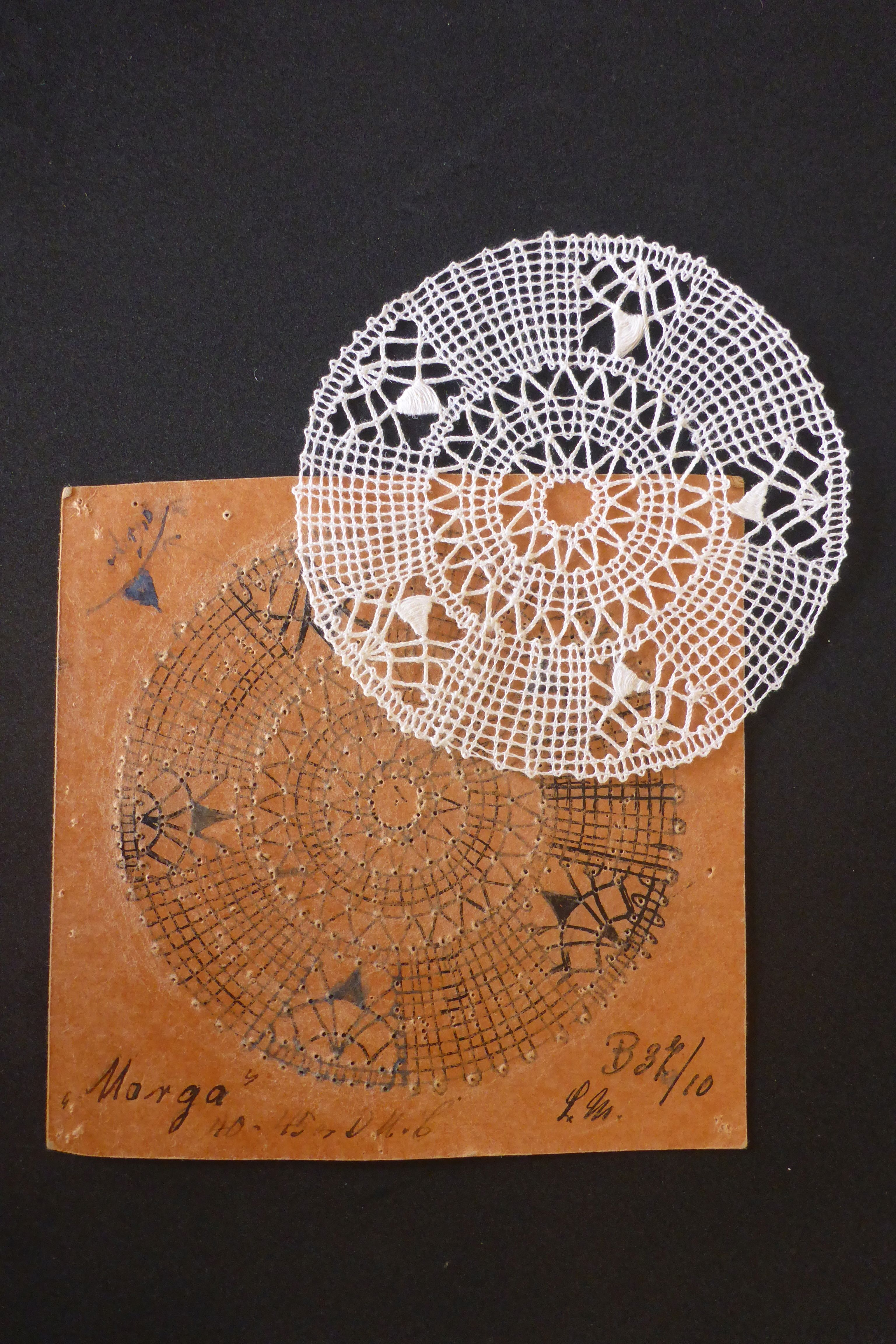 Klöppelbrief und Klöppelspitze